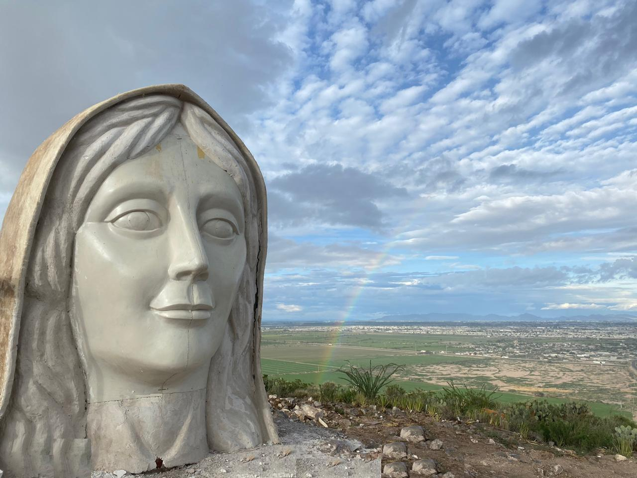 Avance Virgen del Desierto